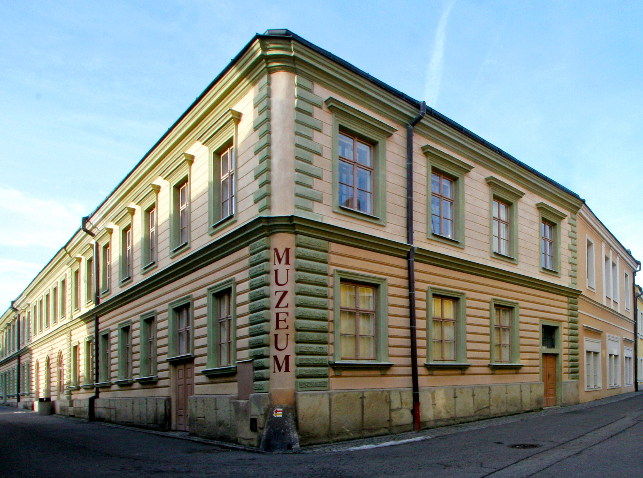 Muzeum - býv. škola a divadlo, Tylova, Šaffova 112, Polička